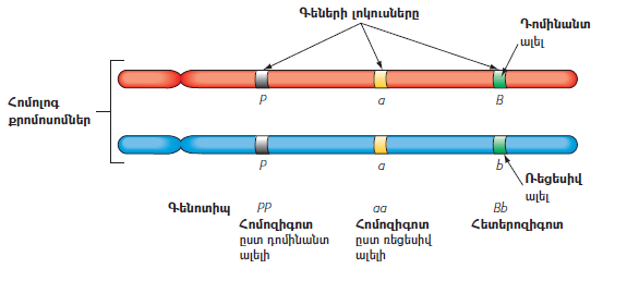 Ալելների և հոմոլոգ քրոմոսոմների կապը